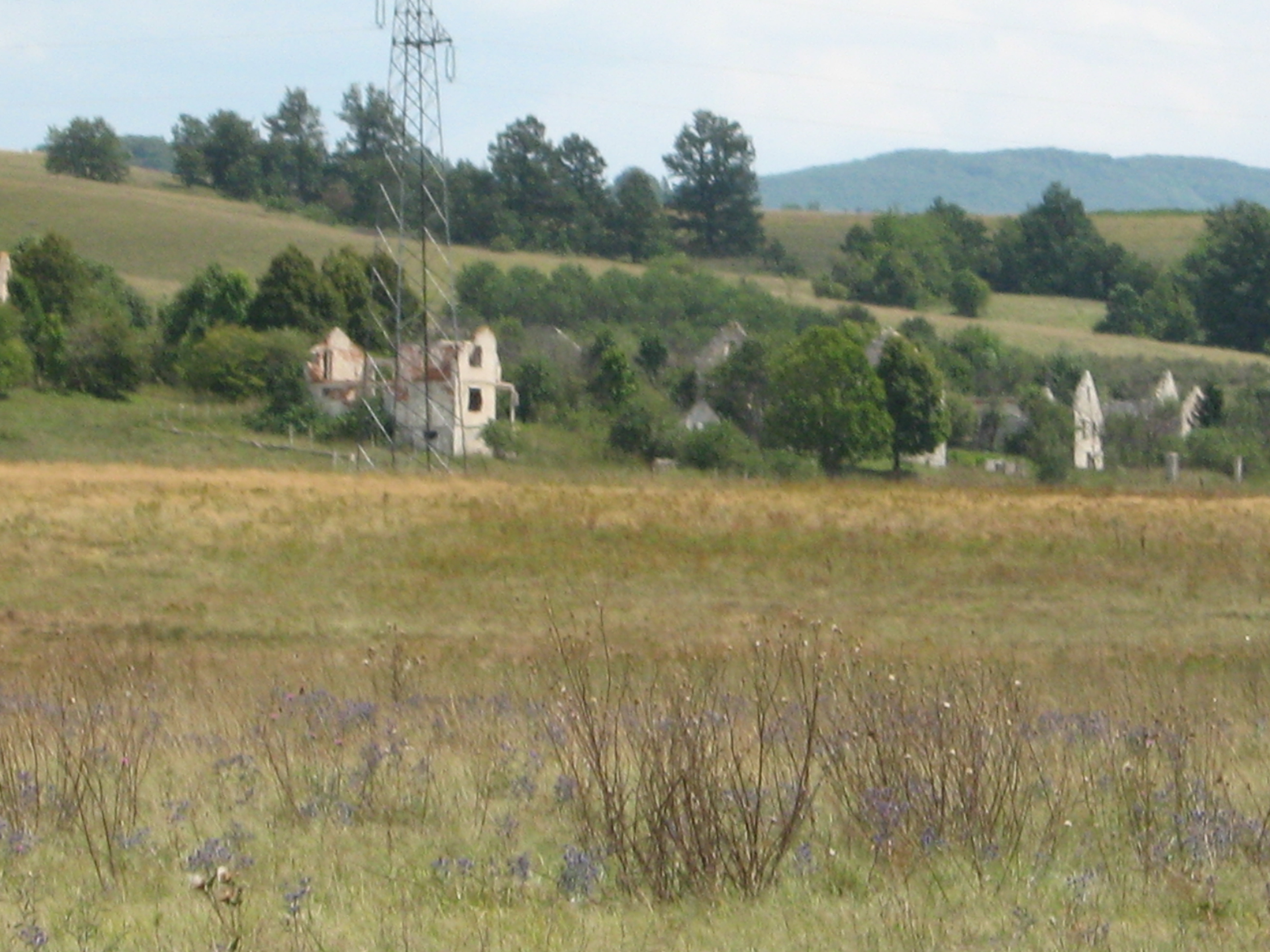 Сам сам сликао